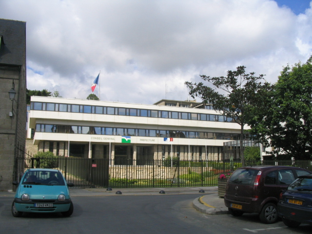 préfecture de saint-brieuc